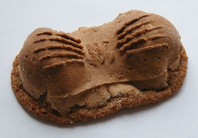 Eine Dettelbacher Muskatzine (Version des Café Achtmann)